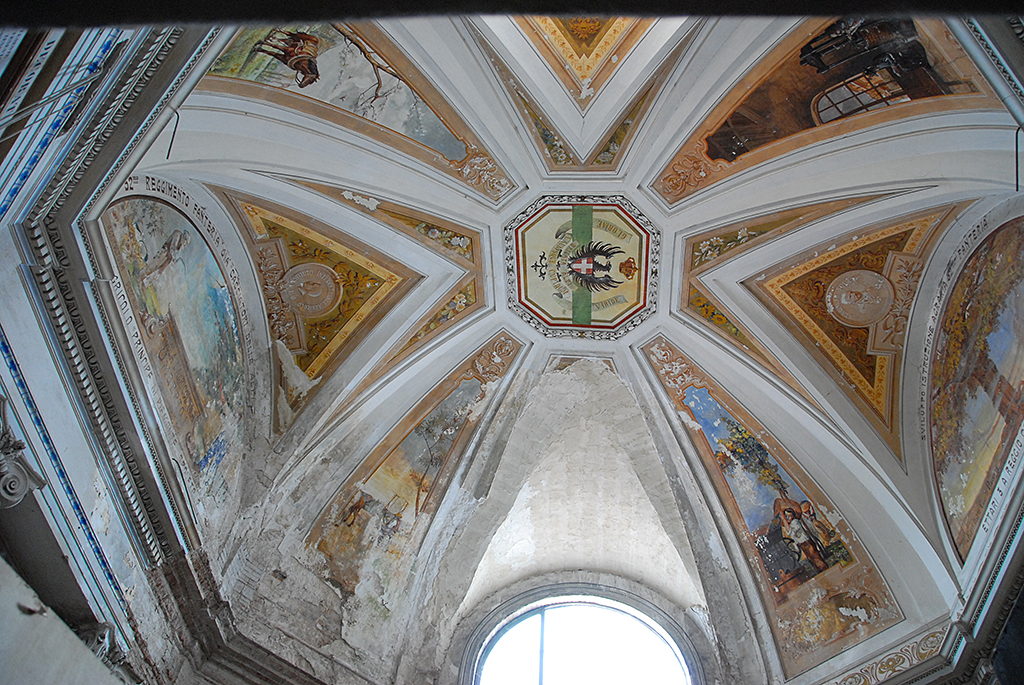 Santi Tommaso e Stefano della Stella - Oratorio